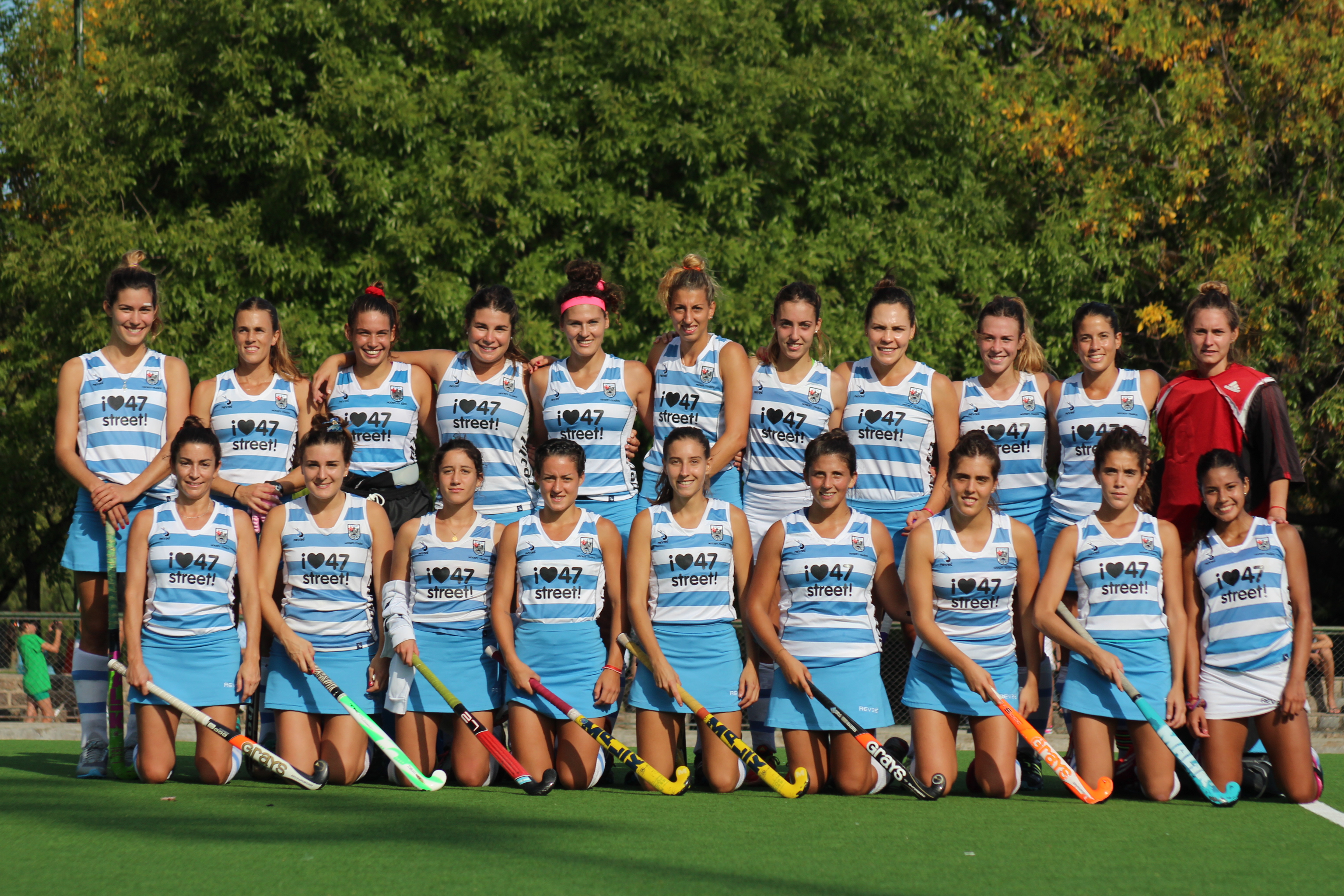 Campeonas 2014 Play OFF